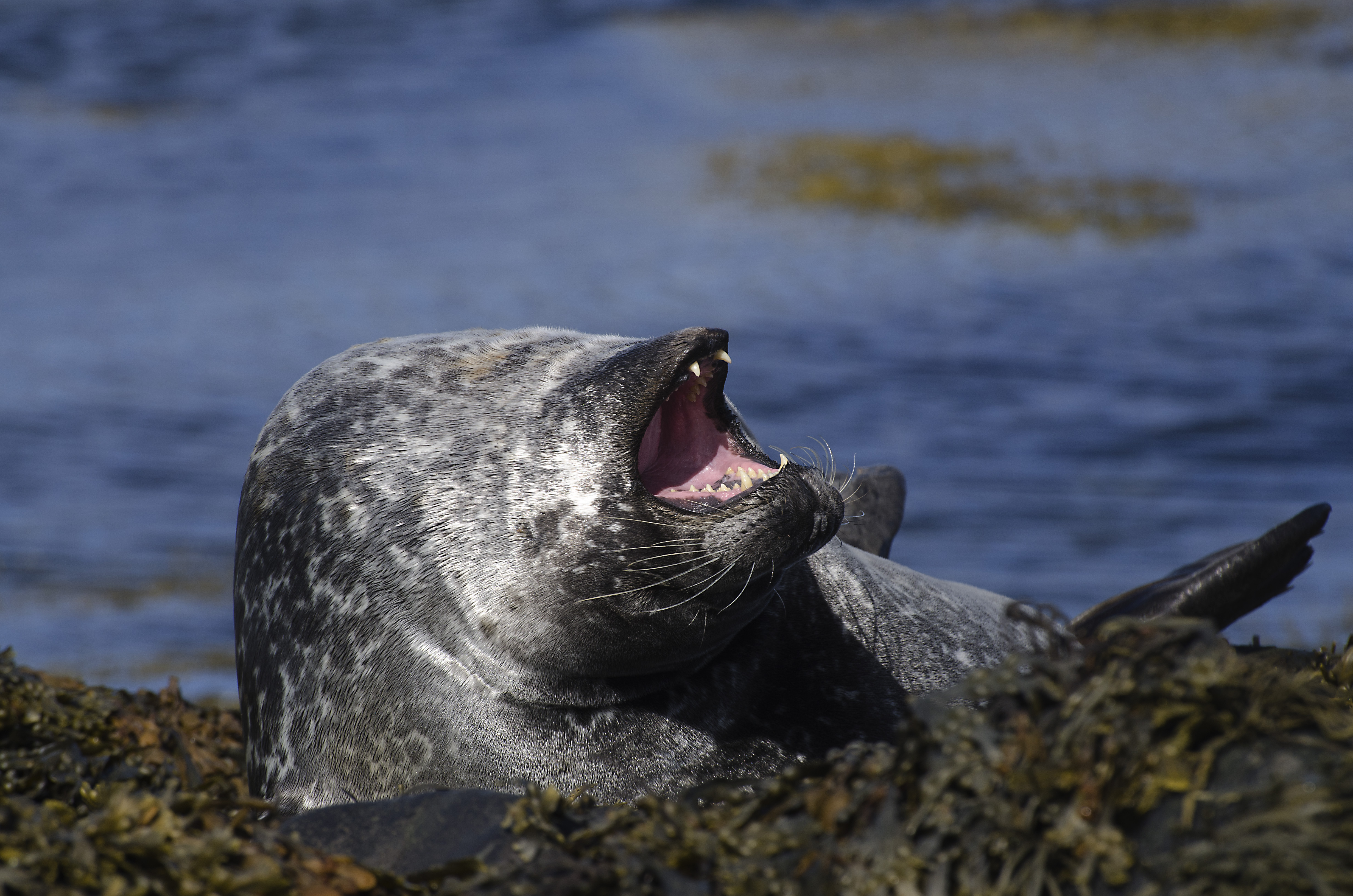 Seehund (Phoca vitulina), Ytri Tunga, Snæfellsbær, Island